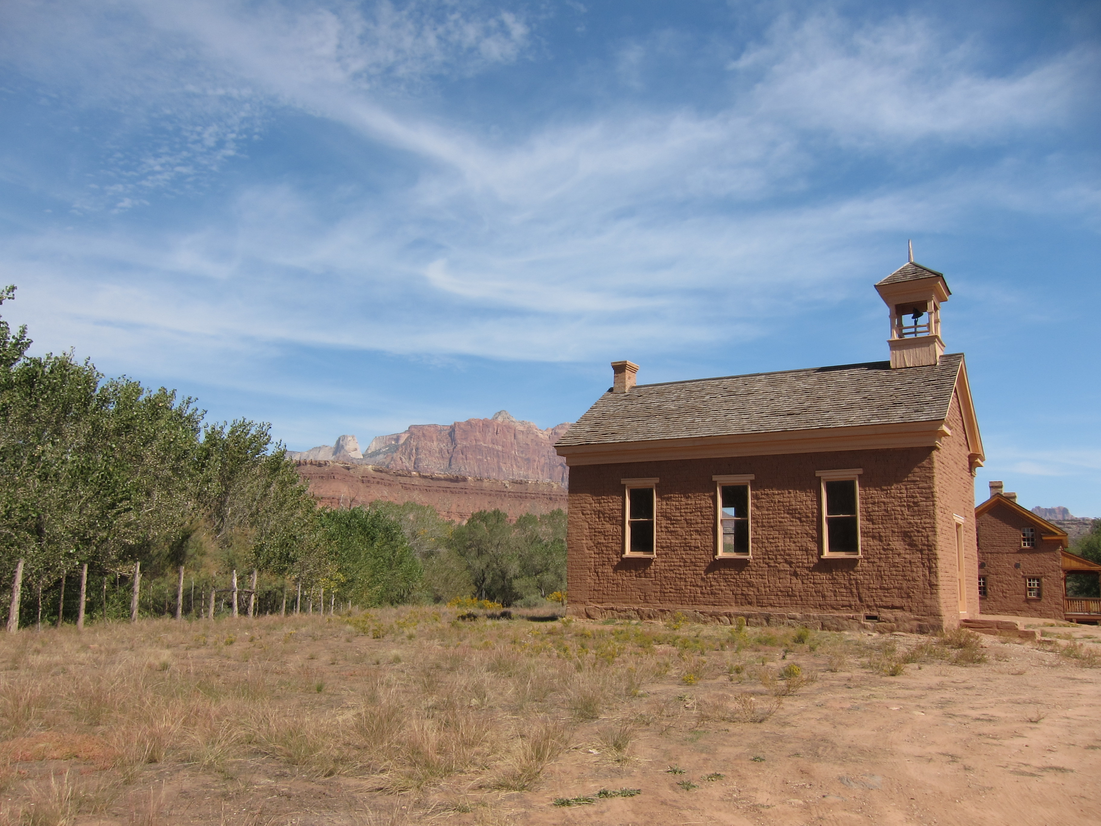 Fabriquée en 1886, restaurée en 2000